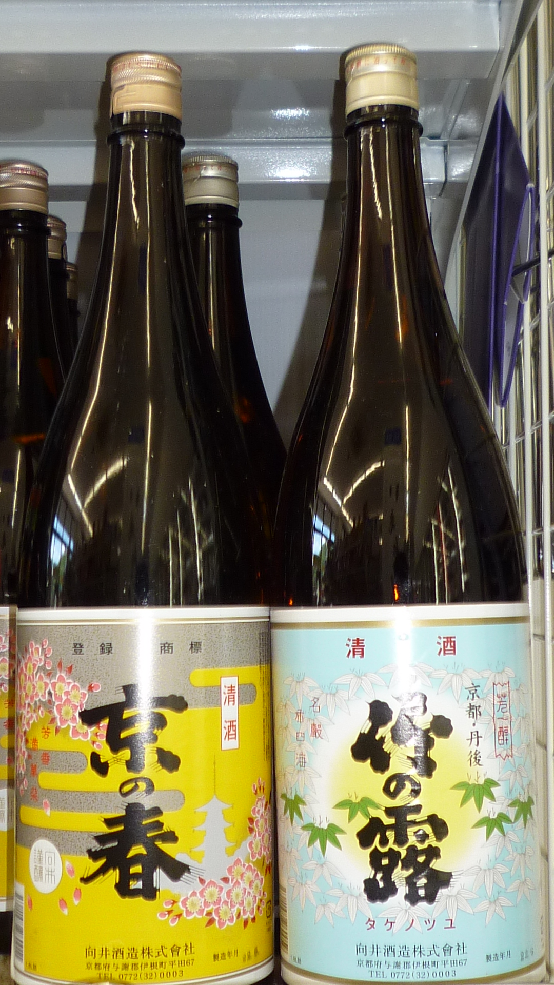 向井酒造（京都府伊根町）の日本酒「京の春」「竹の露」